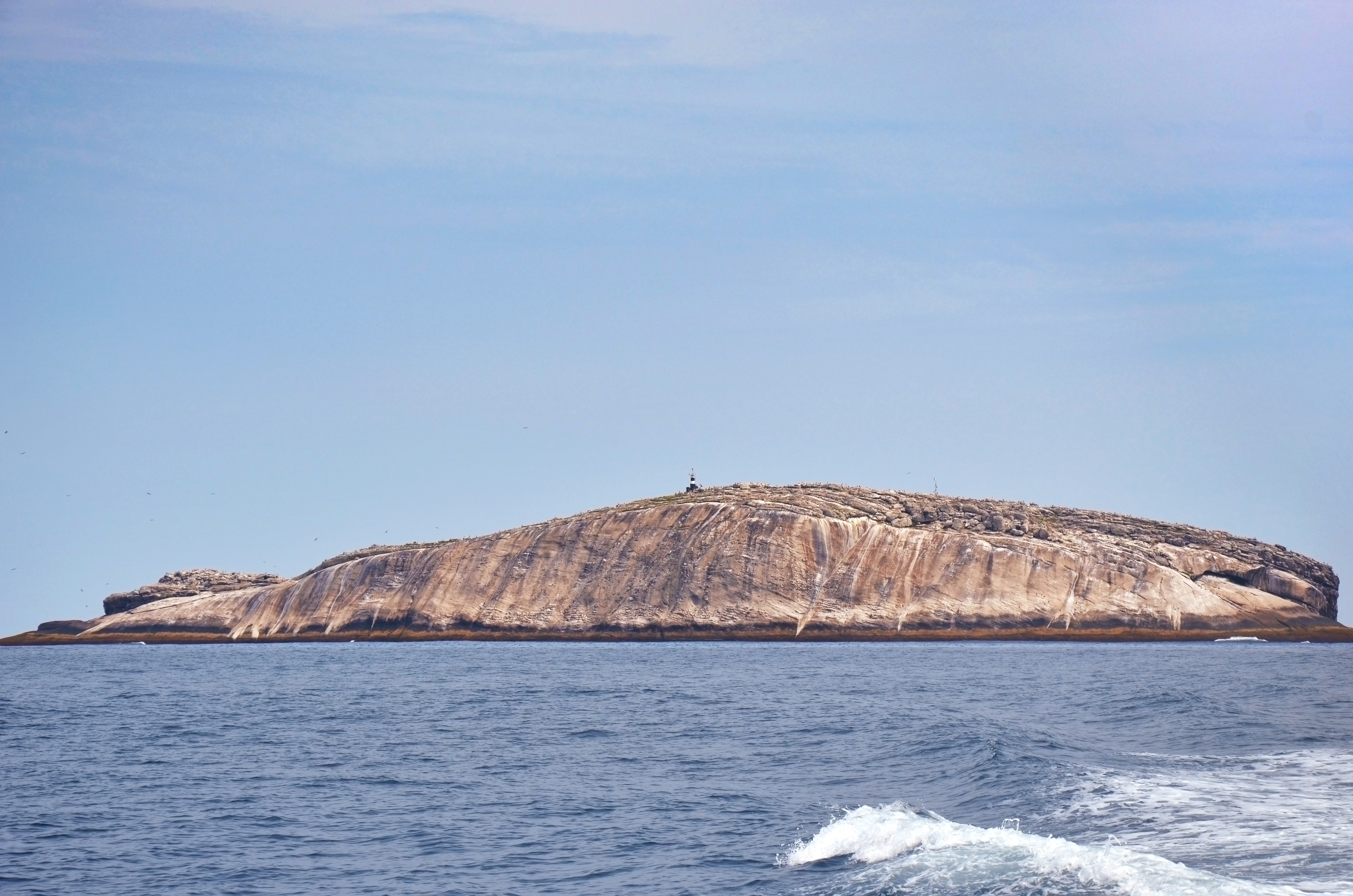 Laje de Santos - Vista do paredão da face sul